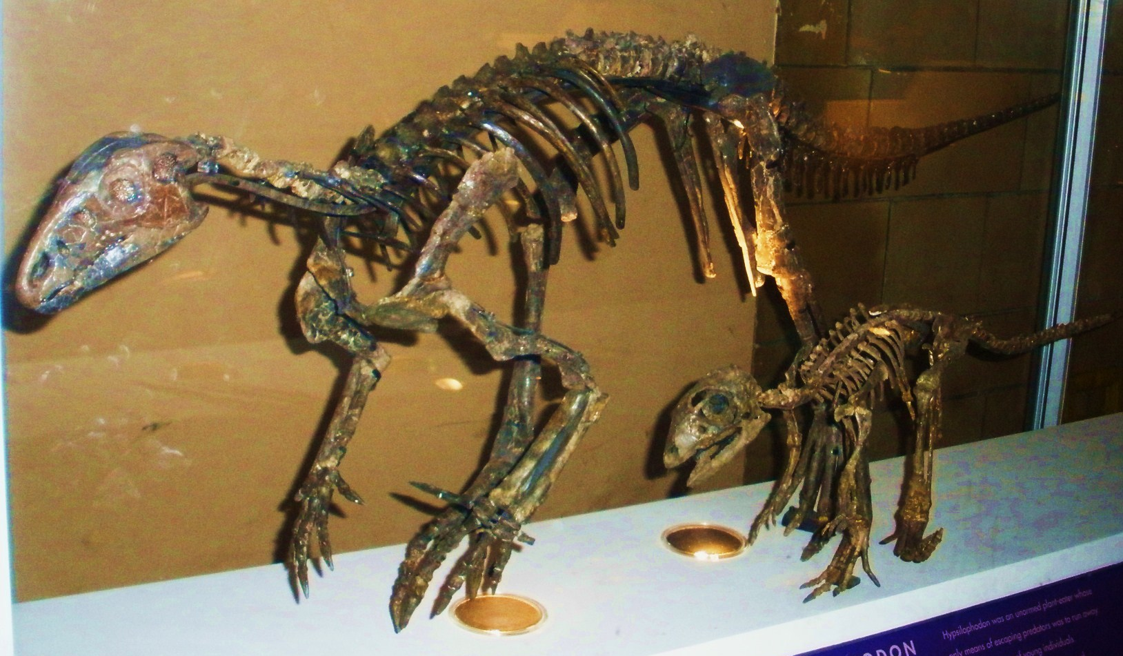 Fossil of Hypsilophodon, an extinct dinosaur-- Took the photo at Natural History Museum, London